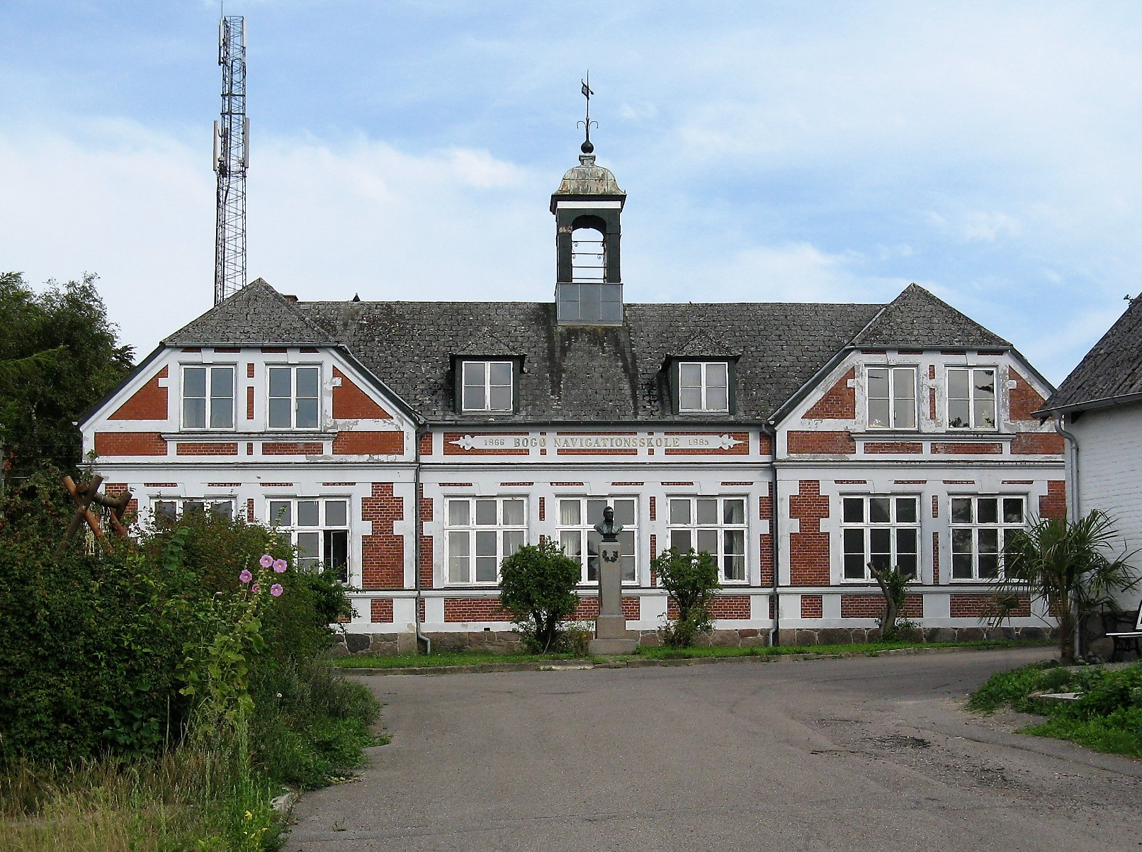 Bogø Navigationsskole 2009